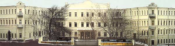 Инстиут Востоковедения при РАН